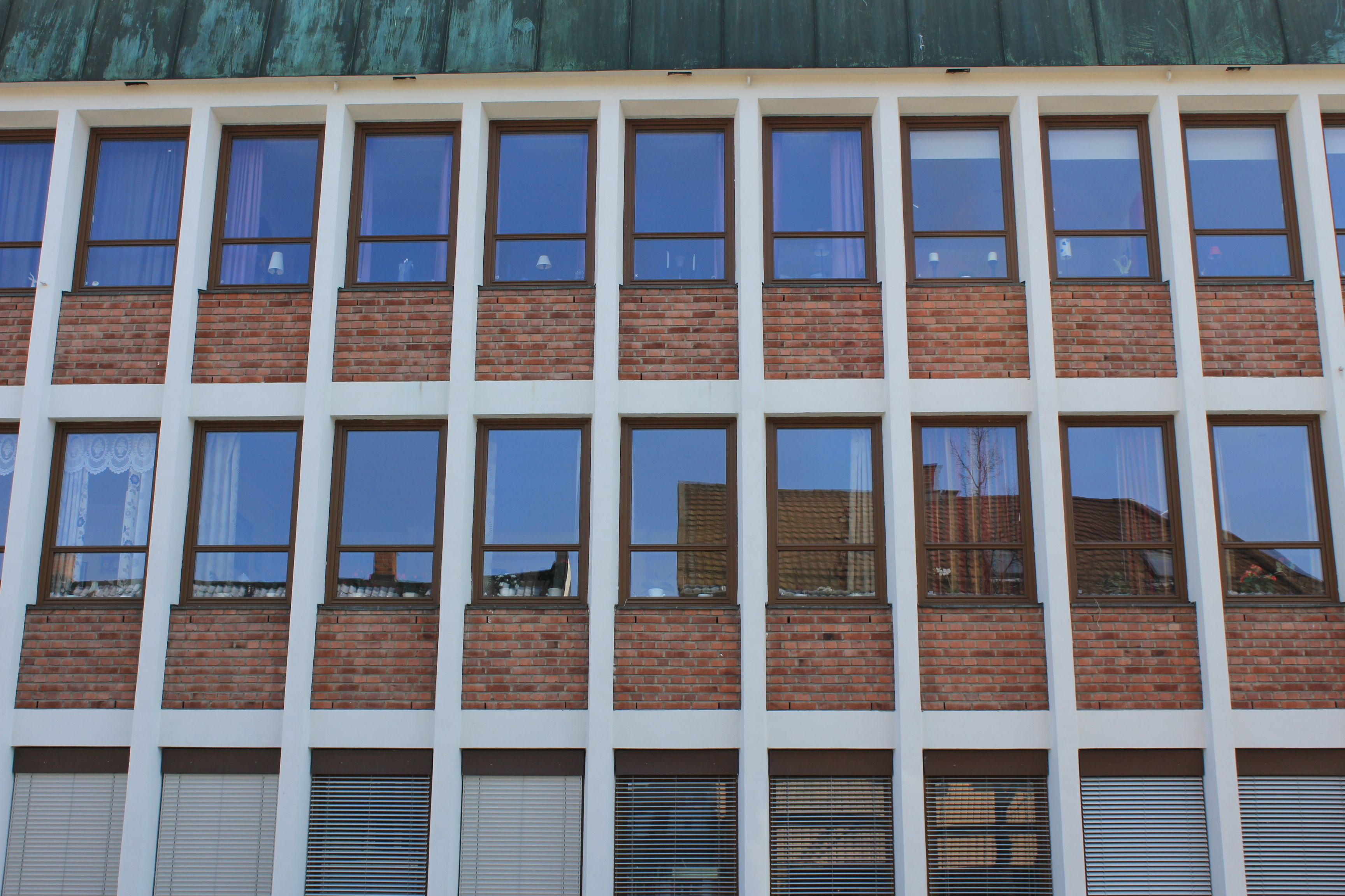 Monoton fasade.